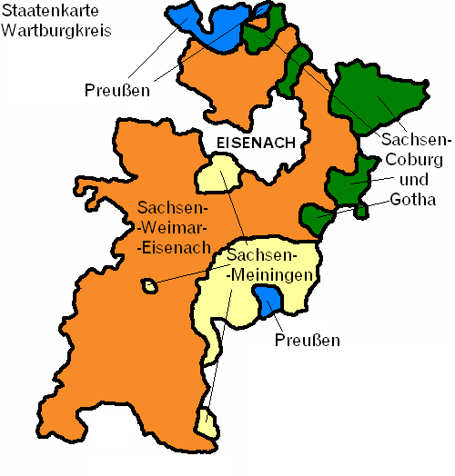 Staatenkarte des Wartburgkreises in Thüringen bis 1922